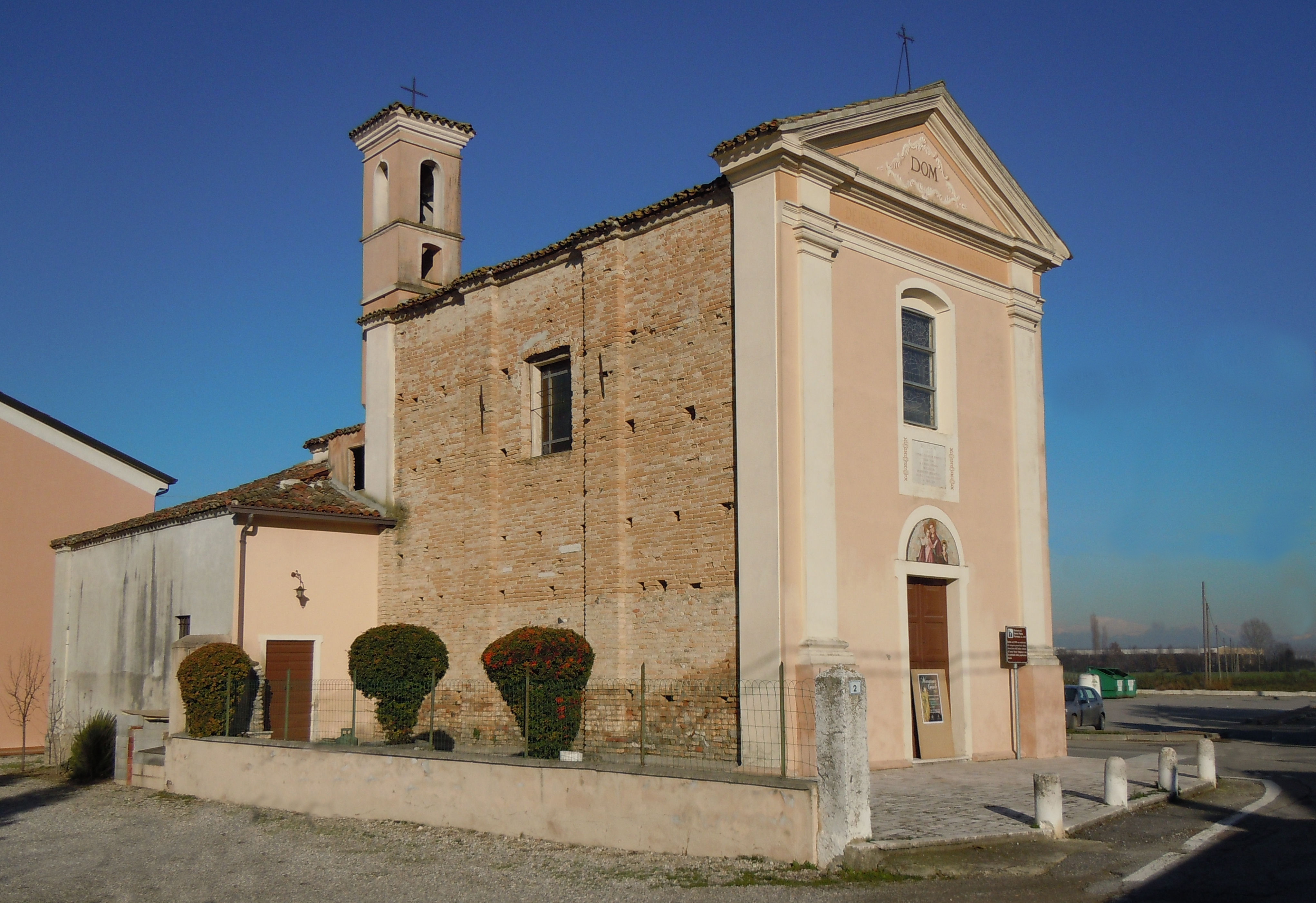 Castel Goffredo, frazione Berenezi, oratorio di Santa Maria Formosa.